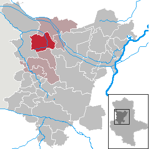 Flechtingen in Saxony-Anhalt (Country) - District (Landkreis) Börde